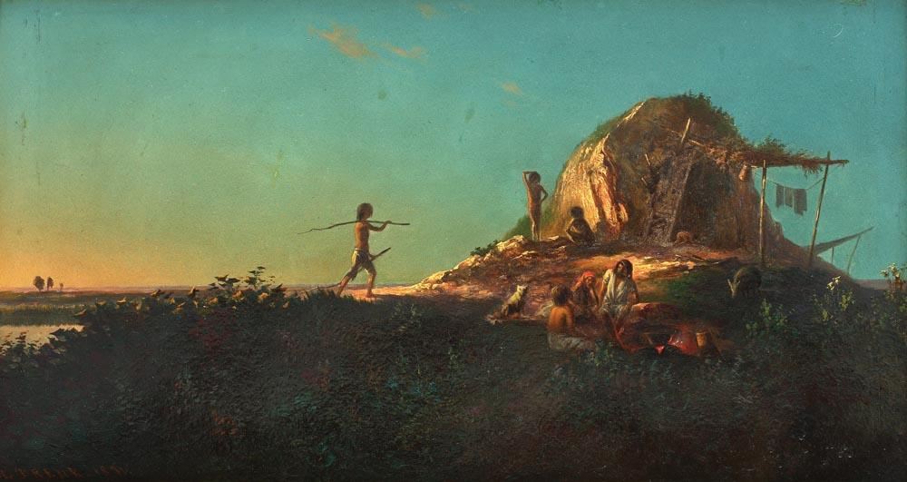 Henric Trenk - Nomazi, ulei pe pânză, 24,5 x 45 cm, semnat şi datat dreapta jos, cu roşu, H. TRENK., 1871.